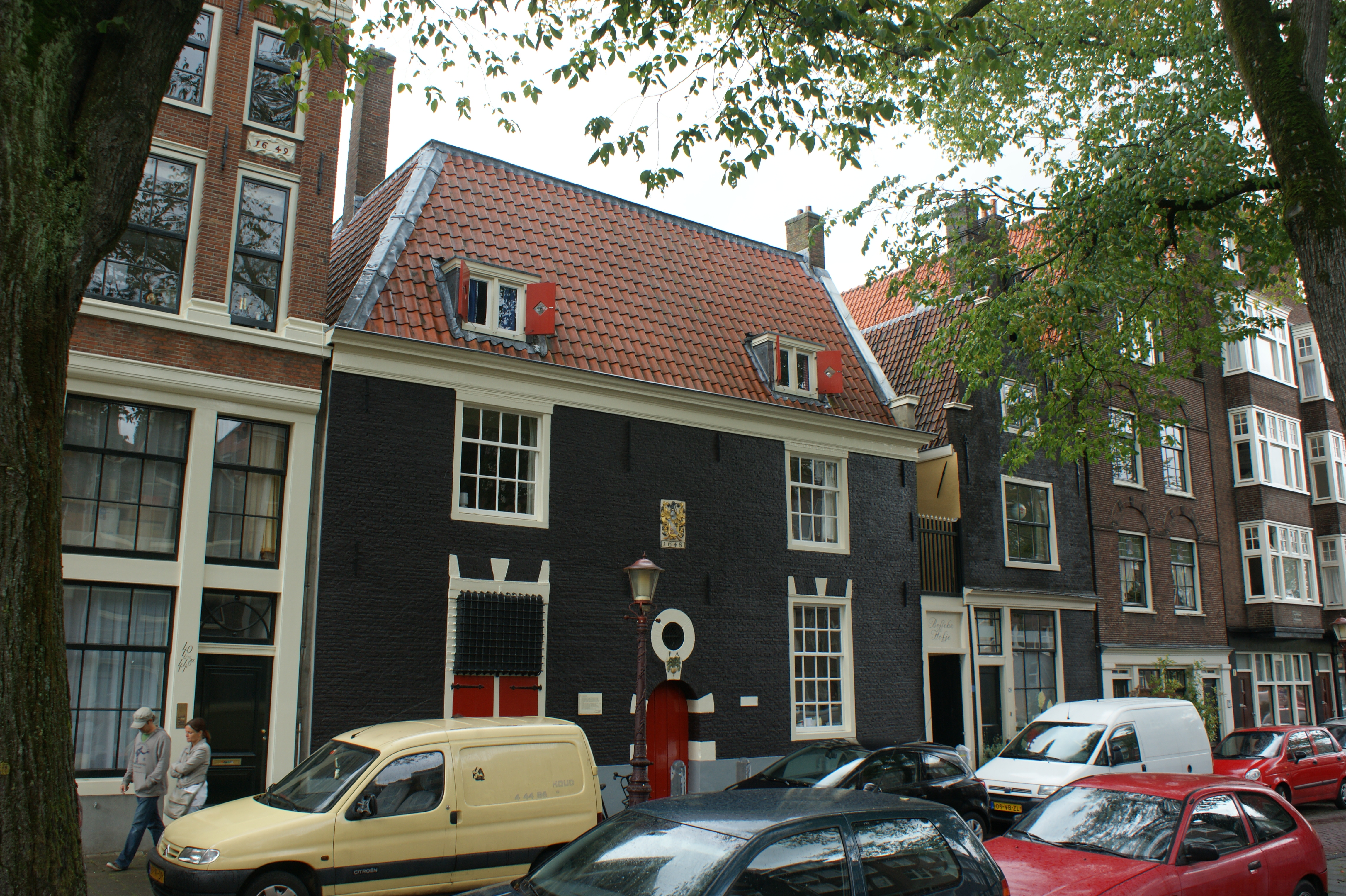 Amsterdam, Palmgracht